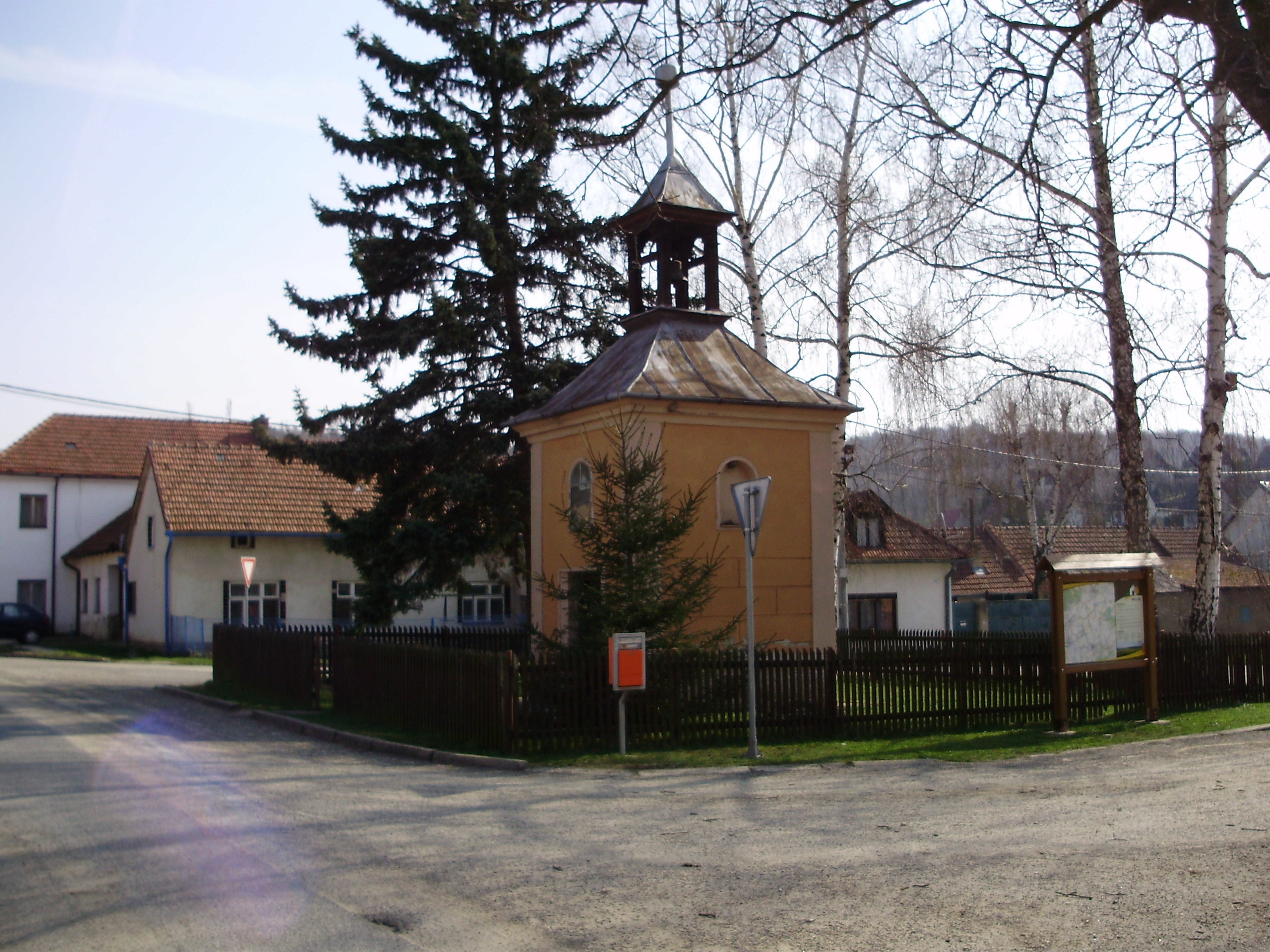 Pavlovice kaple na návsi(Vyškov- Czech republic)